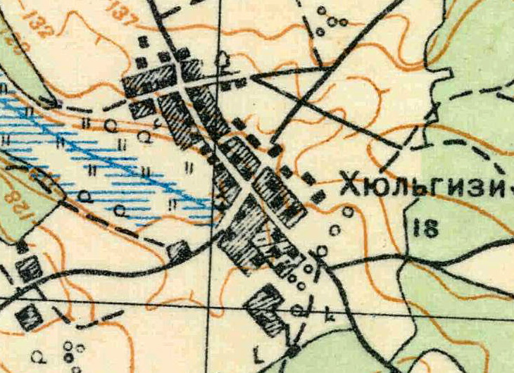 Топографическая карта Ленинградской области, квадрат О-35-24-А-г (Горки), деревня Хюльгюзи